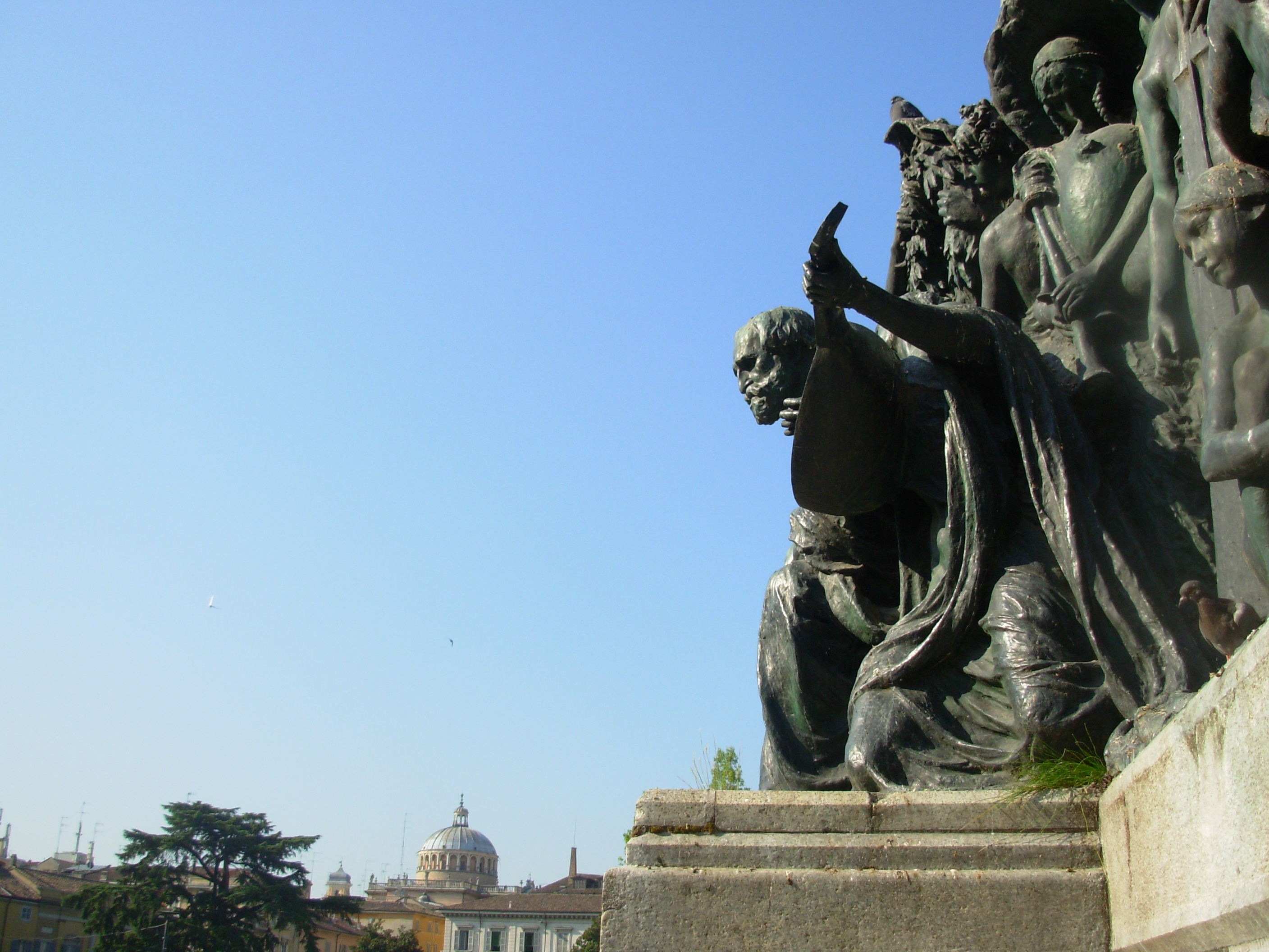 Parma - Monumento a Giuseppe Verdi self-made 25-lug-07 Z-Louis